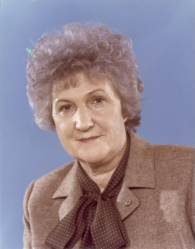 ADN-ZB/Dewag/7.5.82 Berlin: Ingeburg Lange, Kandidat des Politbüros und Sekretär des ZK der SED